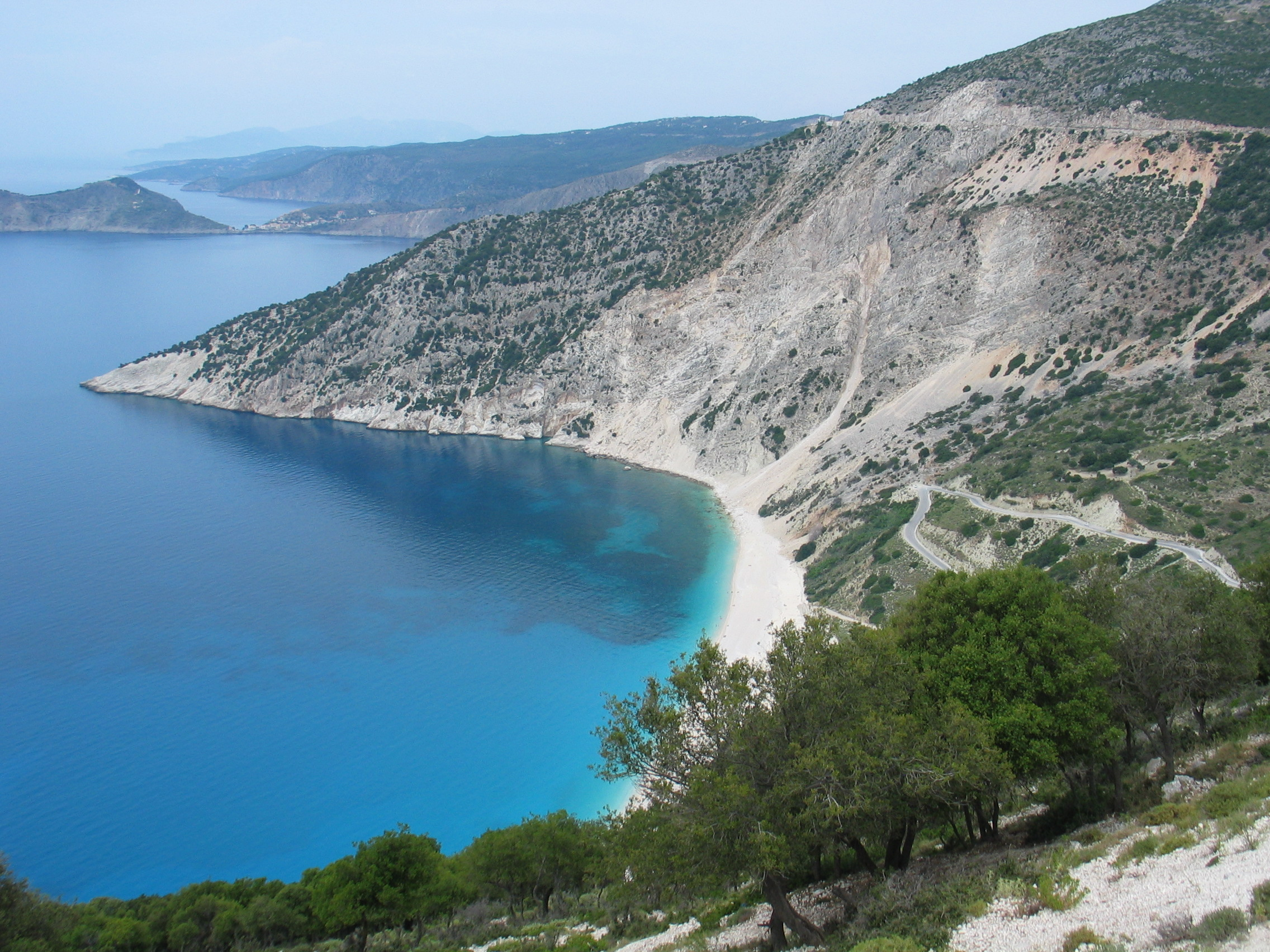 Kust van Kefalonia. De foto is gemaakt op 16 juni 2005 door H. de Vegt.